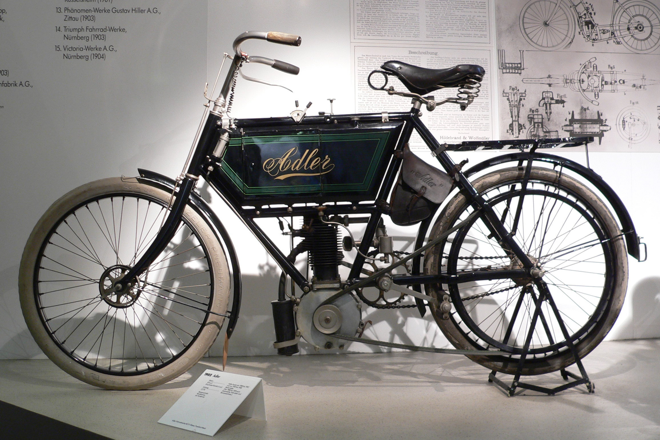 Motorbike "Adler" (1902) at the Deutsches Zweirad- und NSU-Museum